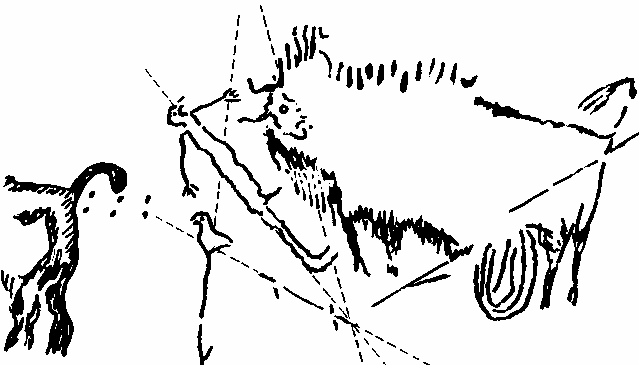 Lascaux, Südfrankreich: Höhlenmalerei mit teilweise astronomischem Inhalt (ca. 20.000 Jahre alt, siehe jeweiligen Bildtext)